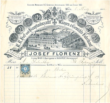 Faktura des Unternehmens Josef Florenz